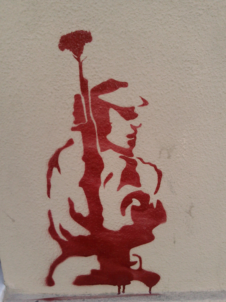 Porto / Portugal